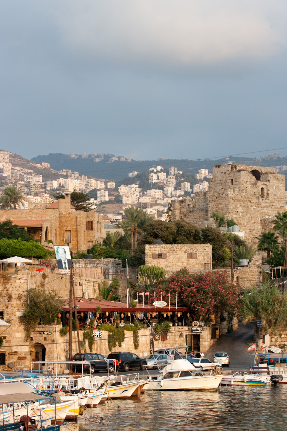 byblos